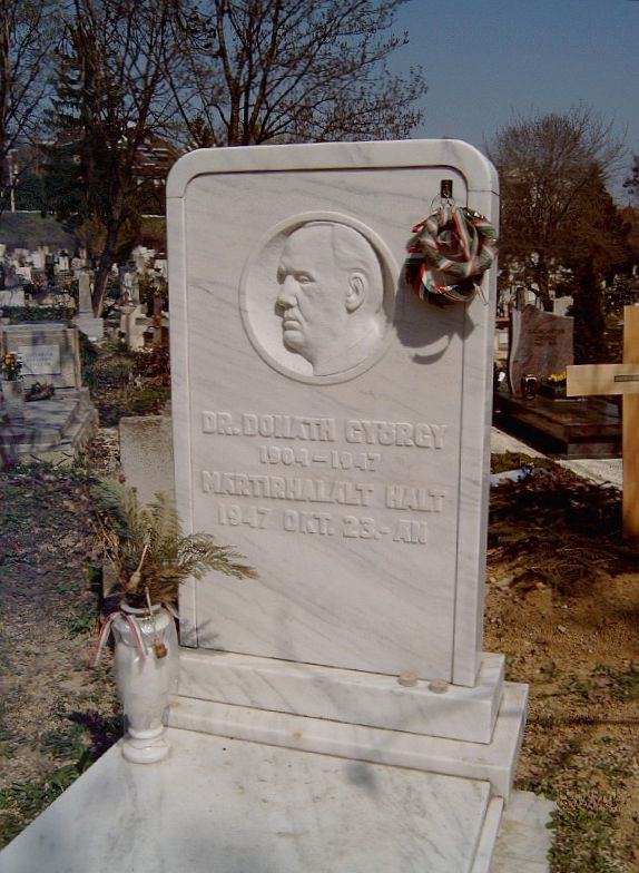 Donáth György (Budapest, 1904. június 5. – Budapest, 1947. október 23.) magyar politikus, a Magyar Közösség egyik vezetőjének sírja Budapesten. Farkasréti temető: 10/1-1-1 [szobrász: Andrássy Kurta János]